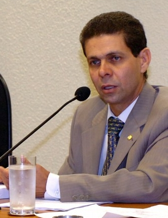 Brasília - O relator da Comissão Parlamentar Mista de Inquérito (CPMI) da Emigração Ilegal, deputado João Magno (PT-MG), apresenta o relatório final da comissão.